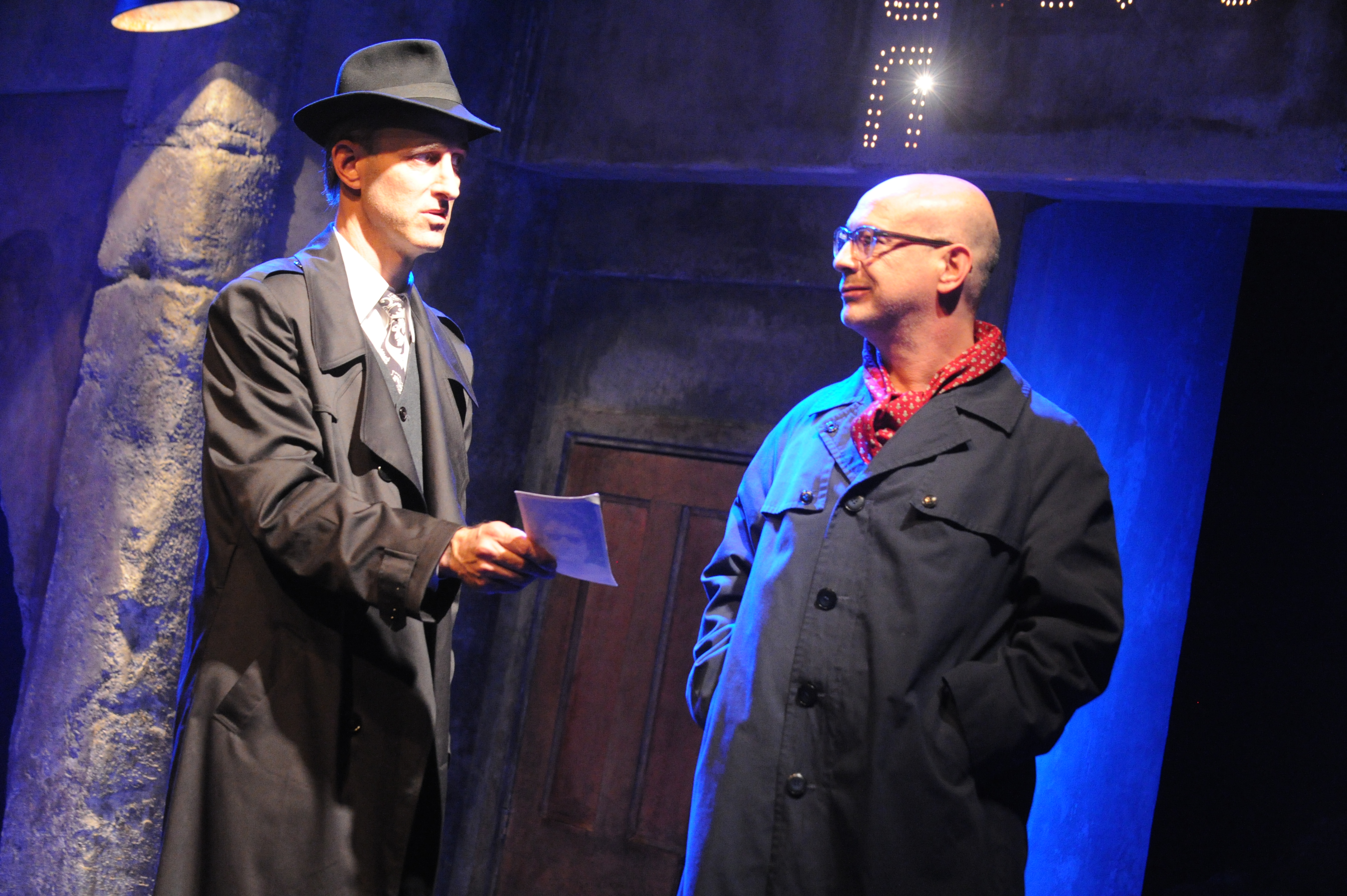 ארז שפריר וניר רון, בהצגה "חוקר פרטי", מאת ובבימויו של מיקי גורביץ', תיאטרון החאן, 2011